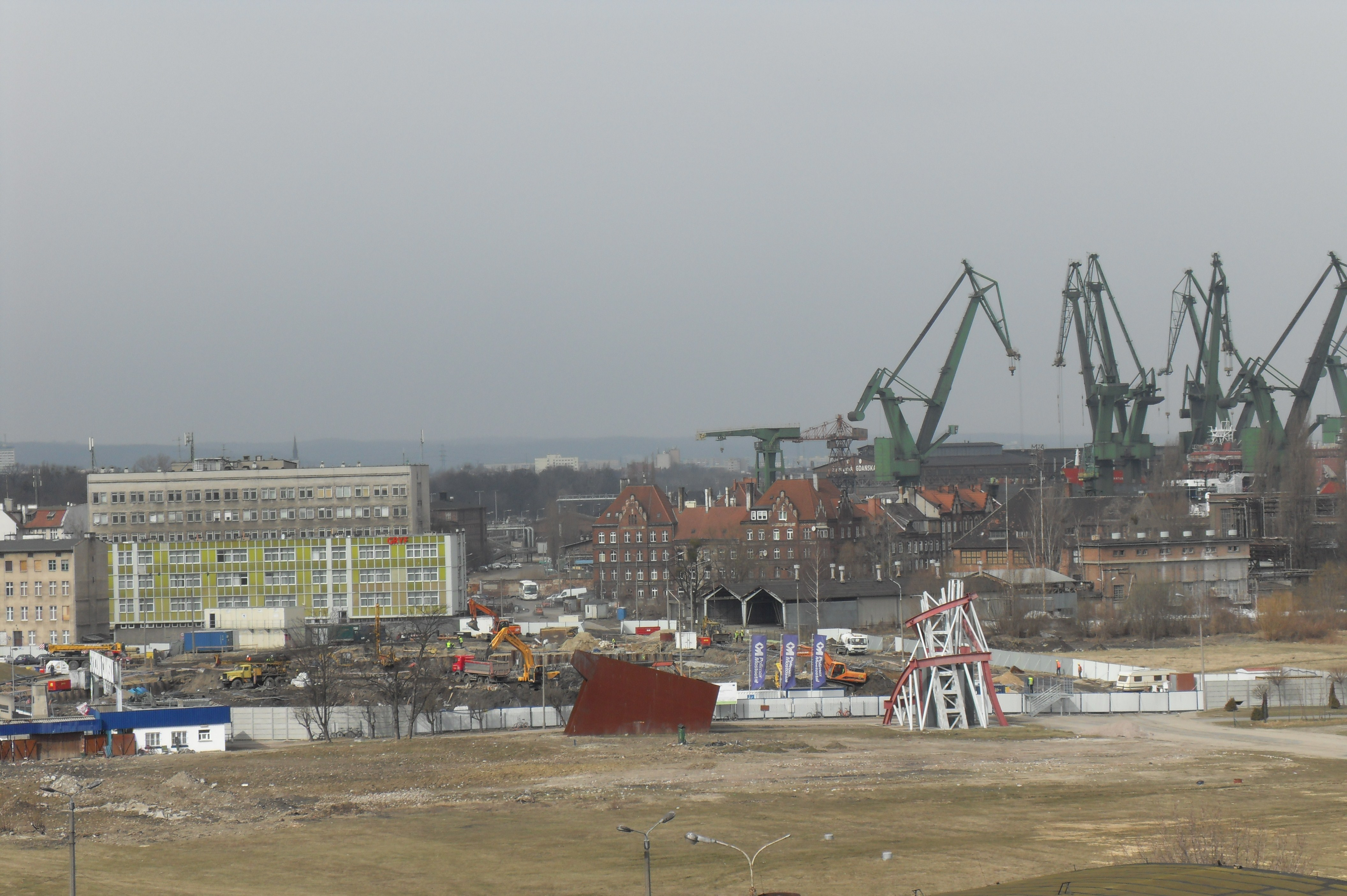 Europejskie Centrum Solidarności (ECS) w Gdańsku, w budowie. Po prawej dźwigi Stoczni Gdańskiej.